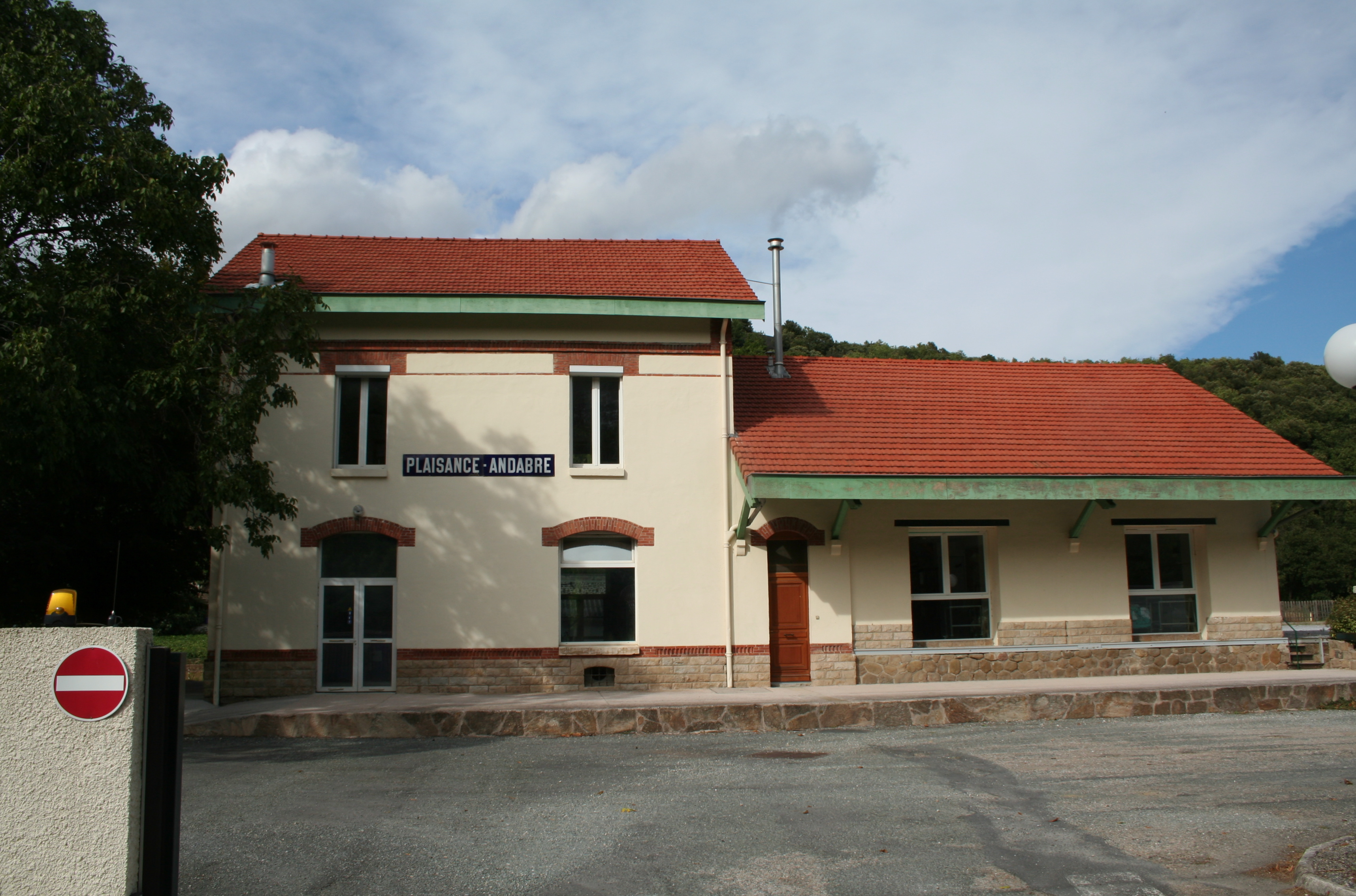 Saint-Geniès-de-Varensal (Hérault) - ancienne gare de la ligne disparue Plaisance - Bédarieux. Cette ligne servait à transporter le charbon des mines de Saint-Geniès.